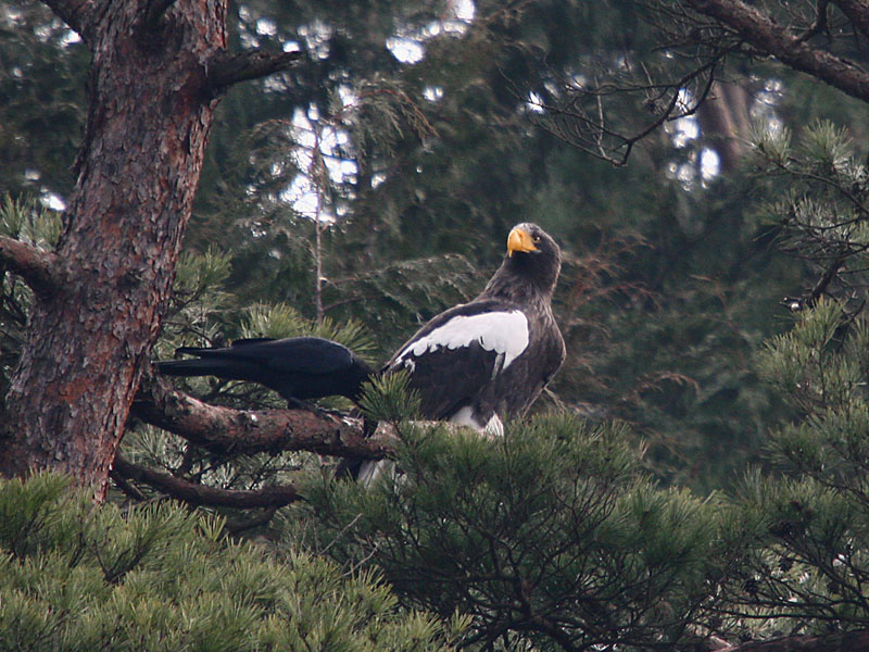 Haliaeetus pelagicus